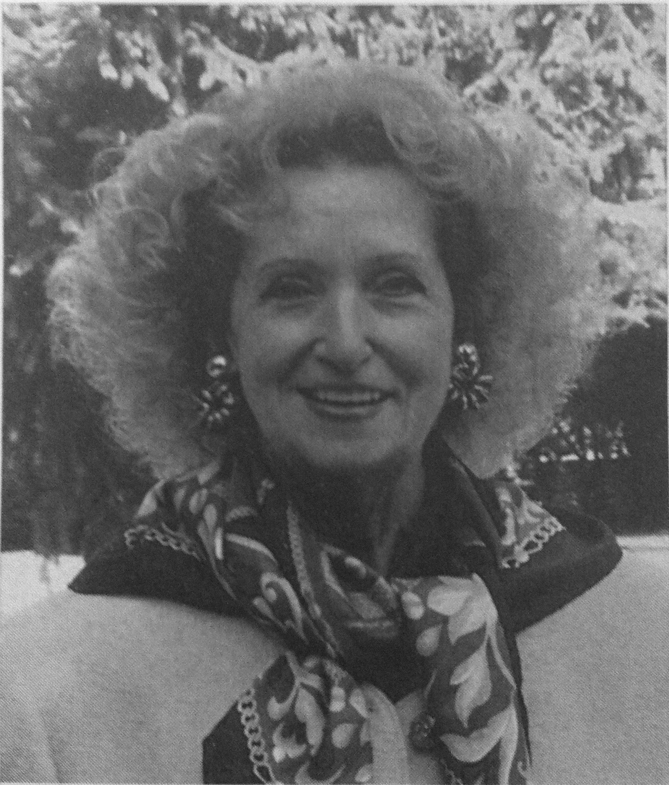 Fotografía de Virginia Tovar Martín